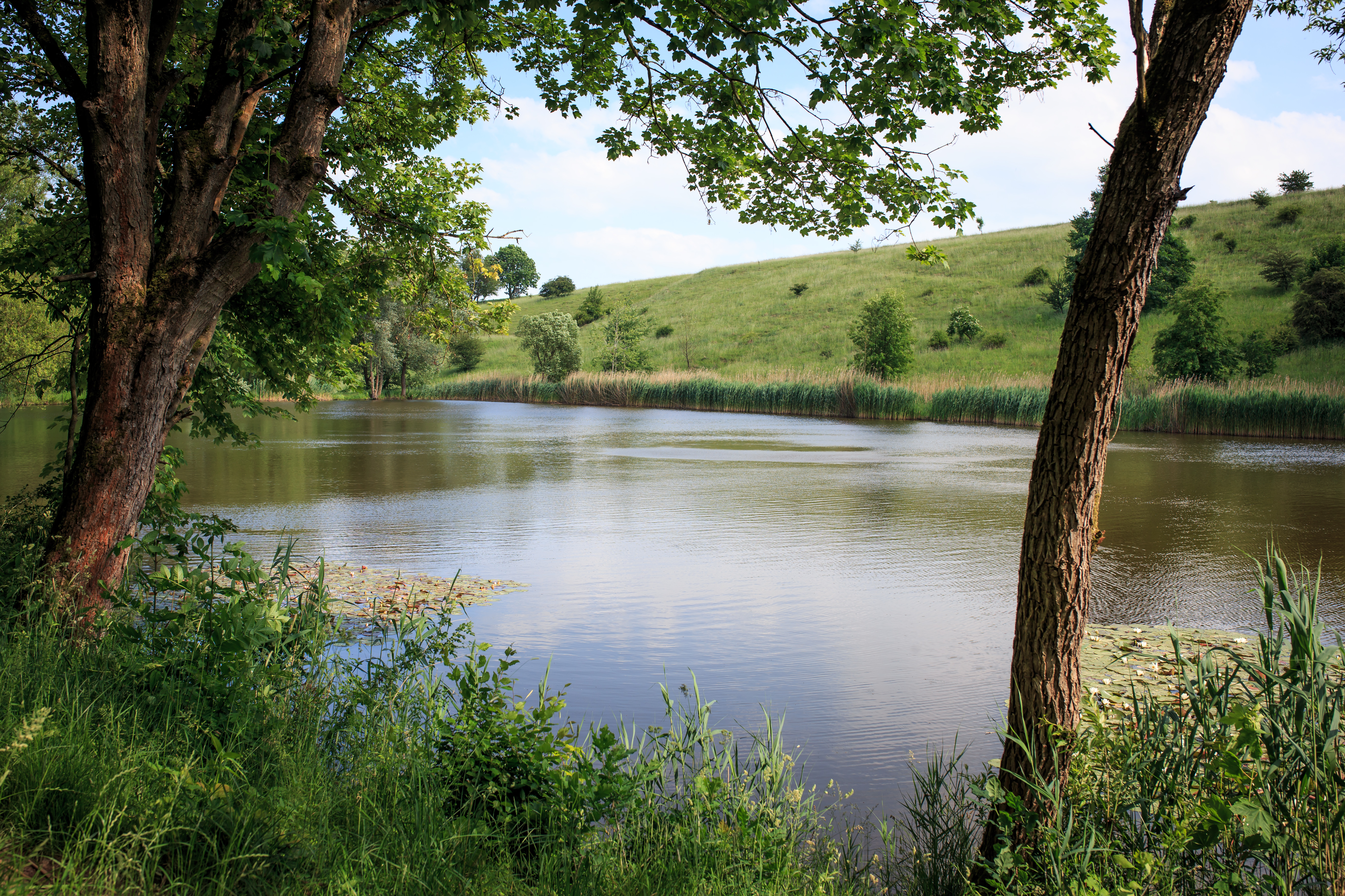 Der Hirschenteich bei Nordhausen-Salza am Fuße des Konsteinmassivs. Fläche: 1,1 ha Max. Tiefe: 2,50 m Durchschn. Tiefe: 1,50 m